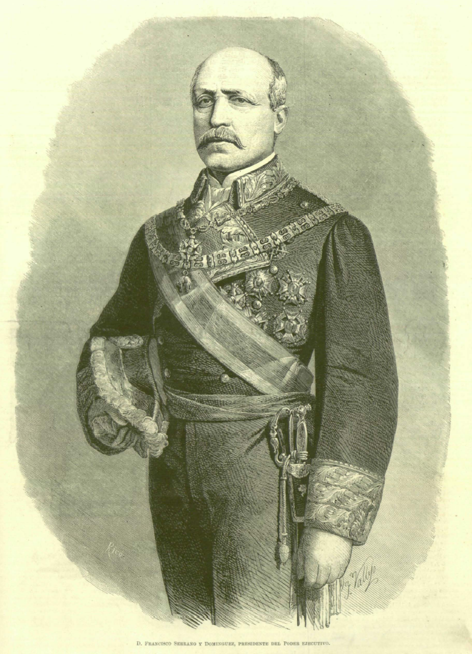 Xilografía del General Francisco Serrano